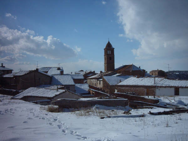 Corbalán (Teruel, Aragón) nevado.